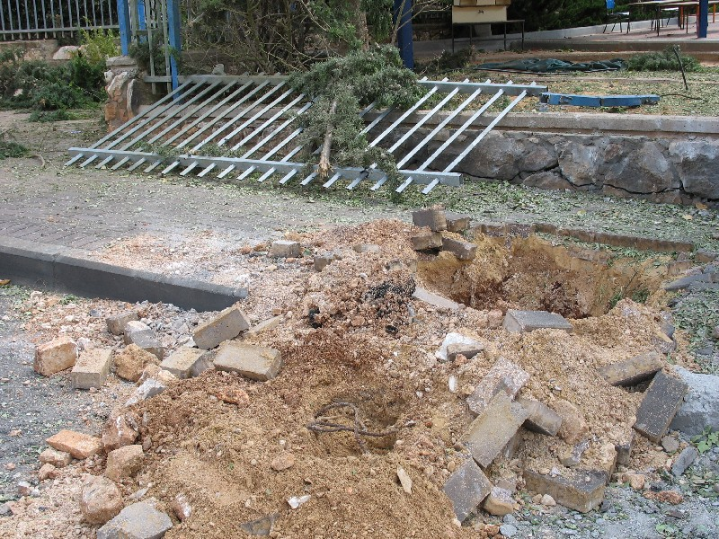 Одно из мест падения ракеты. Вторая ливано-израилская война. Место падения ракеты в Кармиэле. אתר נפילת טיל בכרמיאל במלחמת לבנון השניה